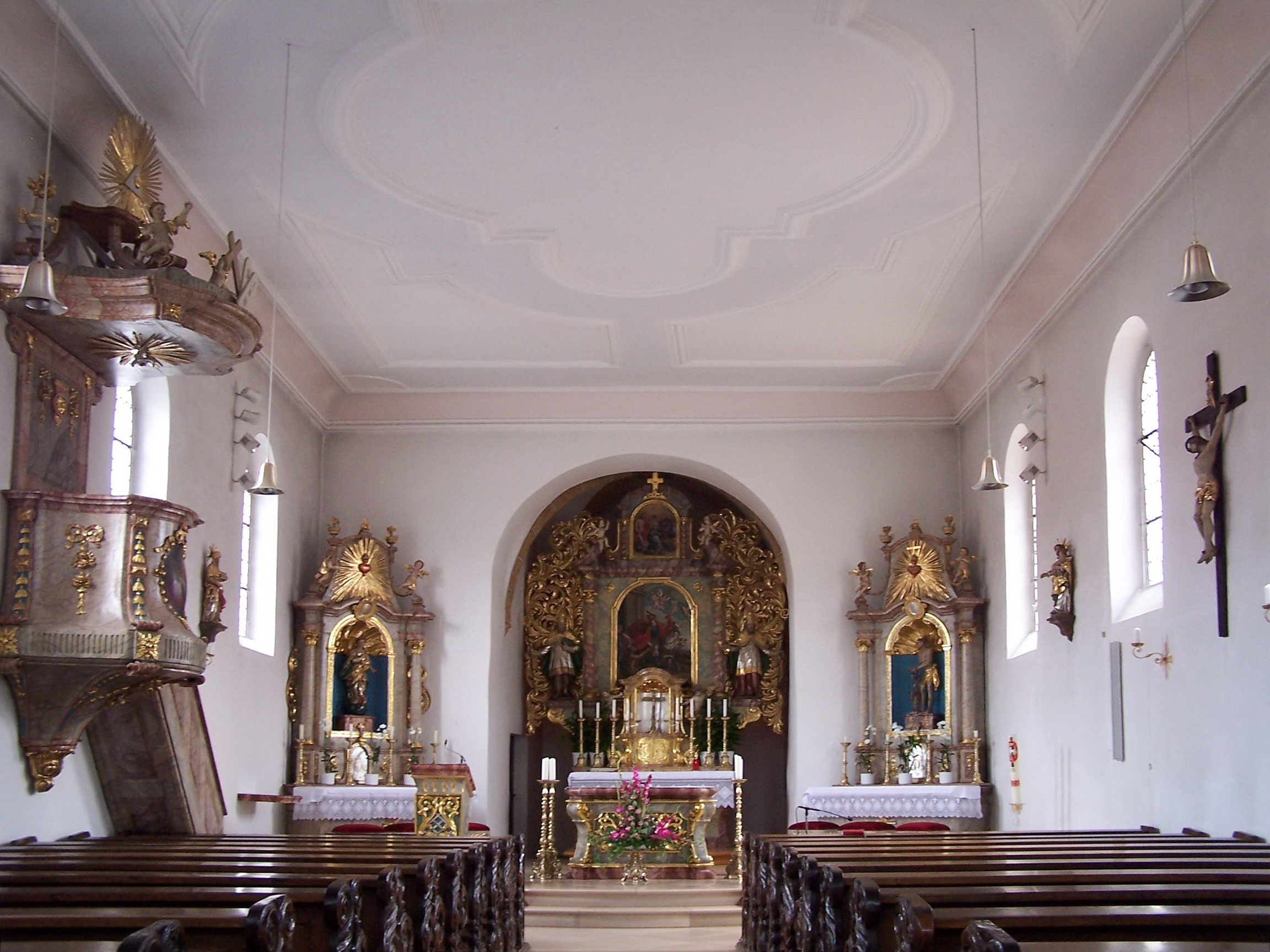 Barbing, Kirchstraße 22. Kath. Pfarrkirche St. Martin. Bau des 17. - 18. Jahrhunderts mit Benutzung des gotischen Ostturmes. Chor im Ostturm mit Rippenkreuzgewölbe. Flachgedecktes Langhaus mit drei Fensterachsen.